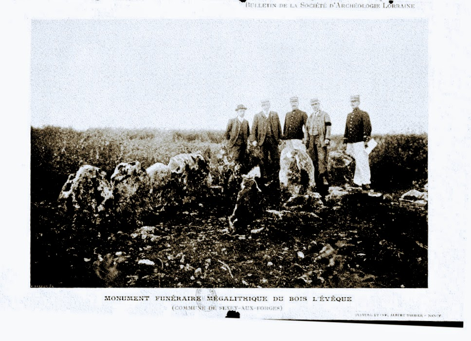 extrait de la notice de Comte J Beaupré